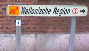 Inscription à Néau (en allem. Eupen), montrant que les communes gérmanophones de Belgique font partie de la Wallonie.